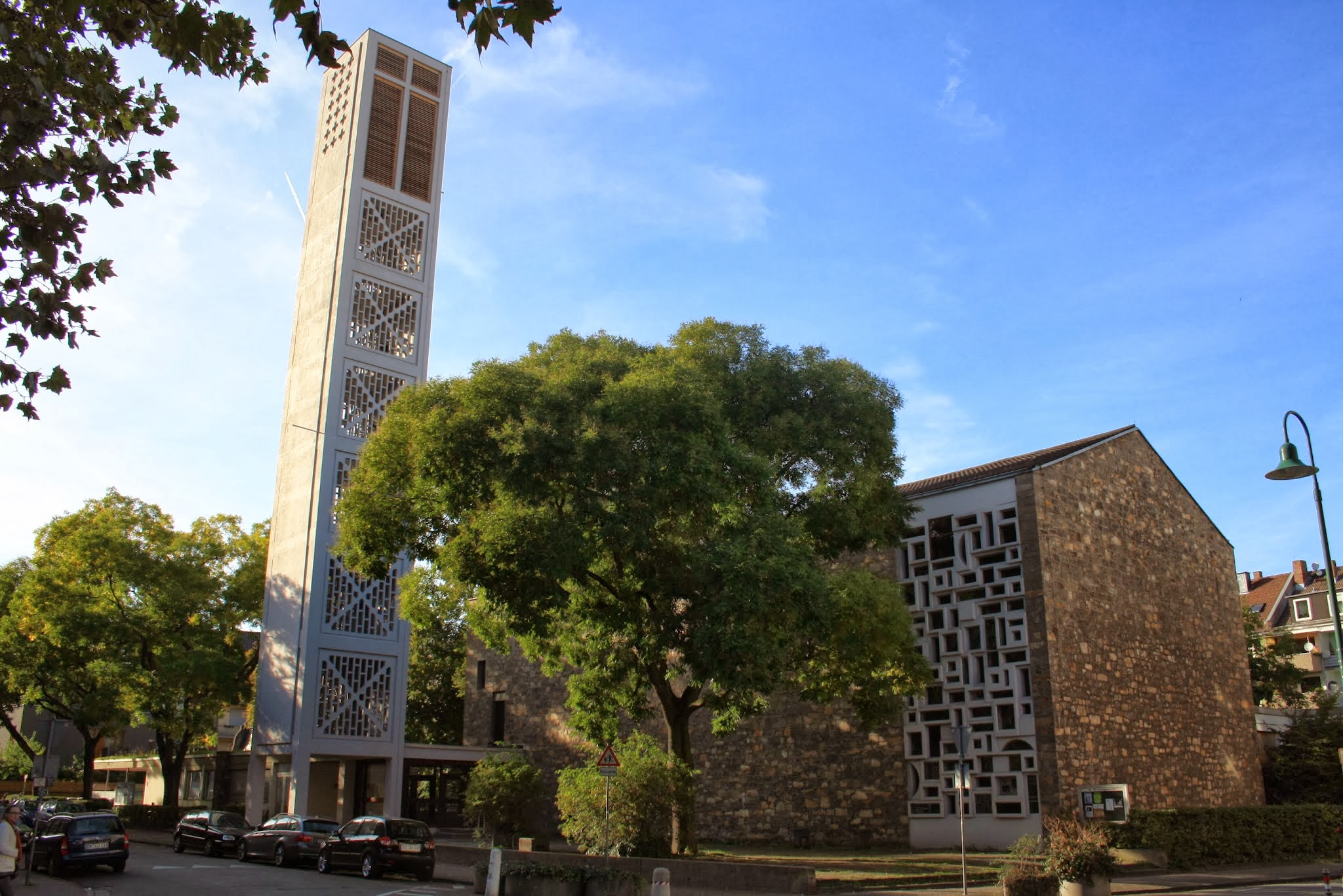 Martinsviertel, Darmstadt, Germany